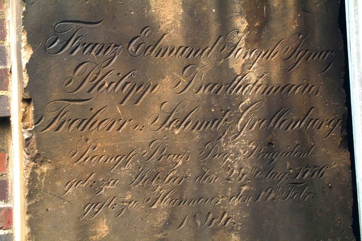 Detail der Grabplatte von Franz Edmund Joseph Ignaz Philipp Bartholomaeus Freiherr von Schmitz Grollenburg, Königlich Preußischer Regierungspräsident ...1776-1844